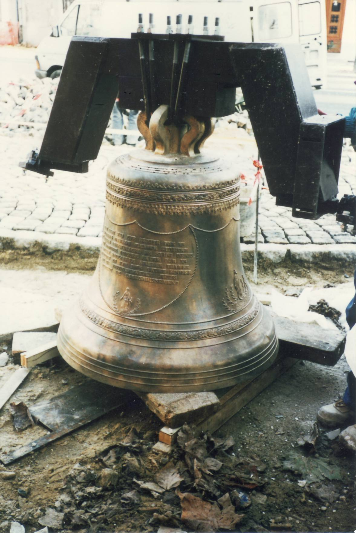 La Cloche de l'Église Saint-Liphard de Villetaneuse